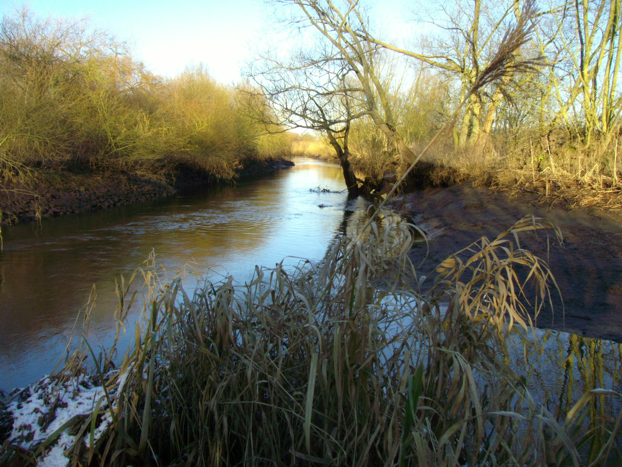 Der Zusammenfluss von Luhe in die Ilmenau